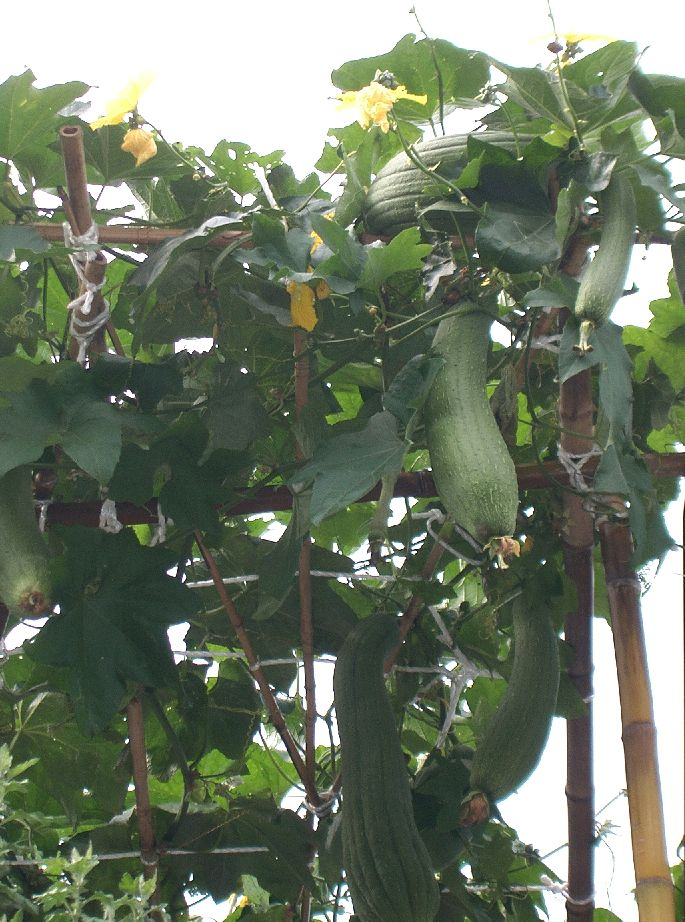 Luffa cylindrica（synonym Luffa aegyptica)